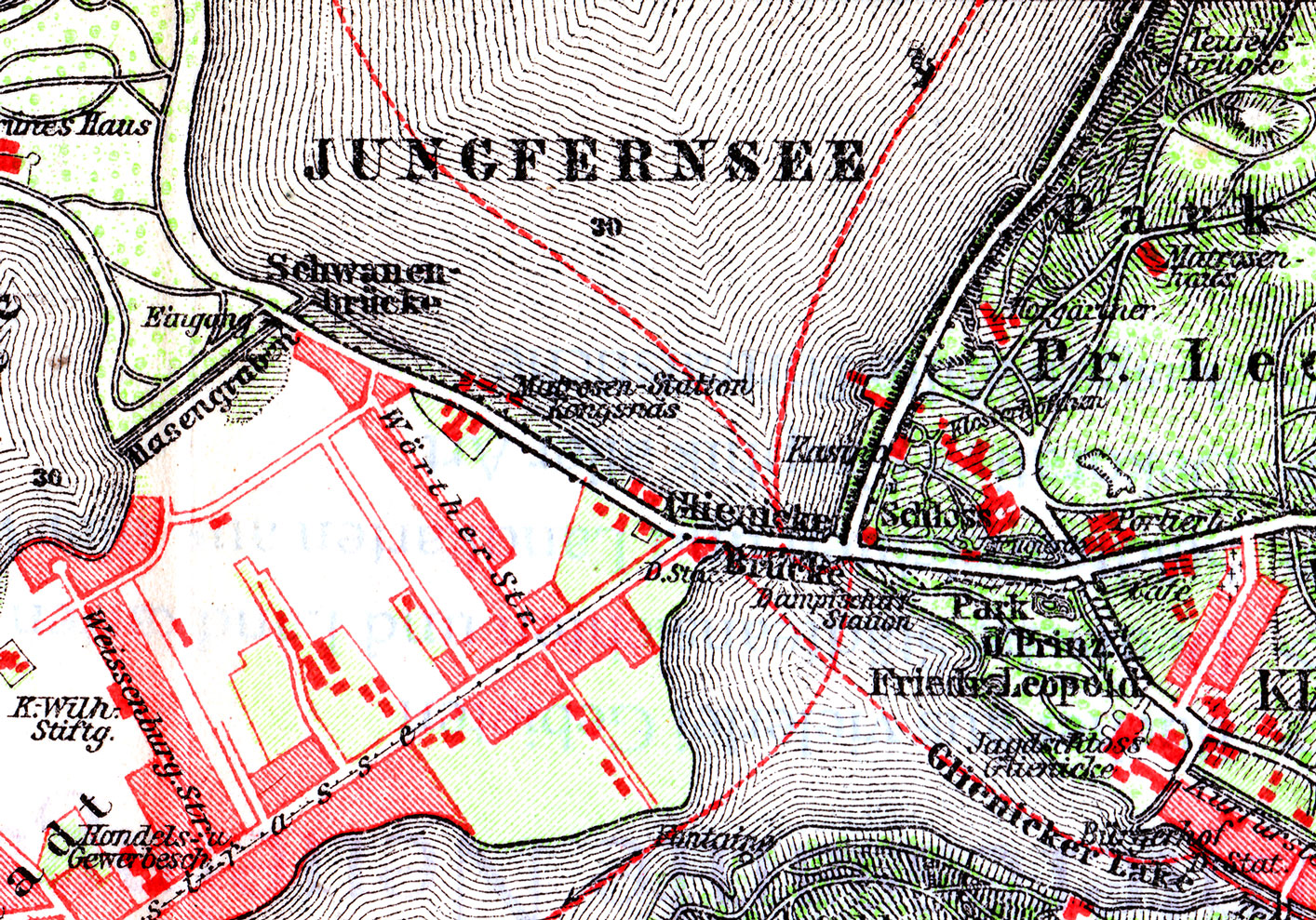 Potsdam - Umgebung der Glienicker Brücke (Ausschnitt)